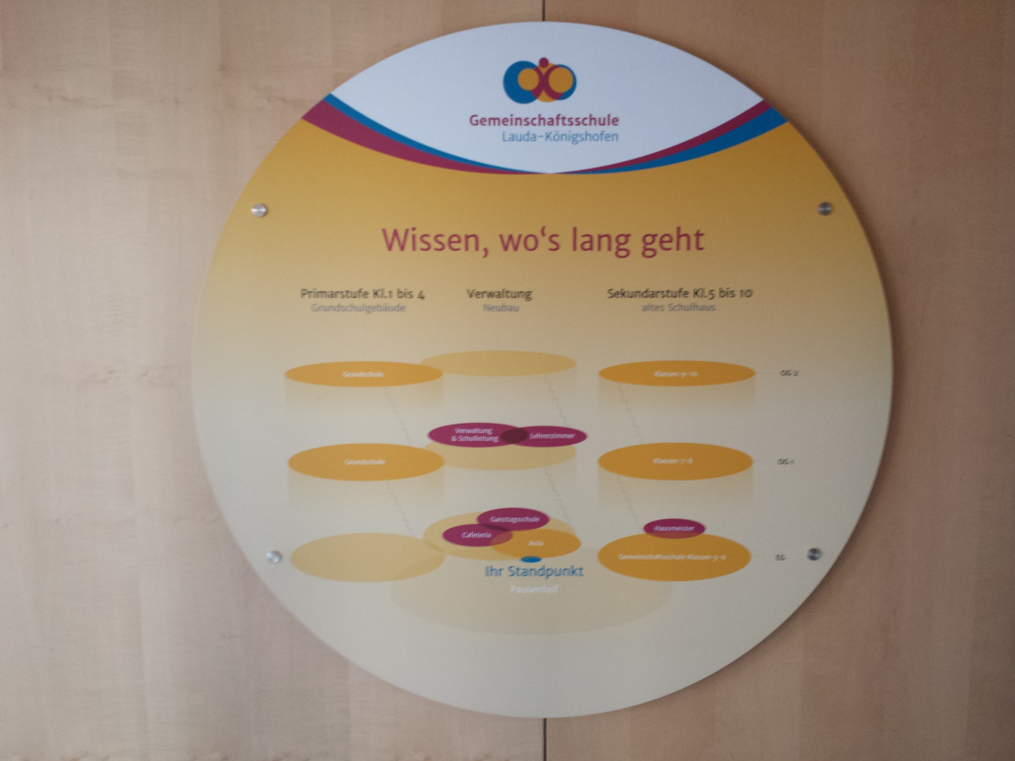 Gemeinschaftsschule Lauda-Königshofen Übersichtstafel